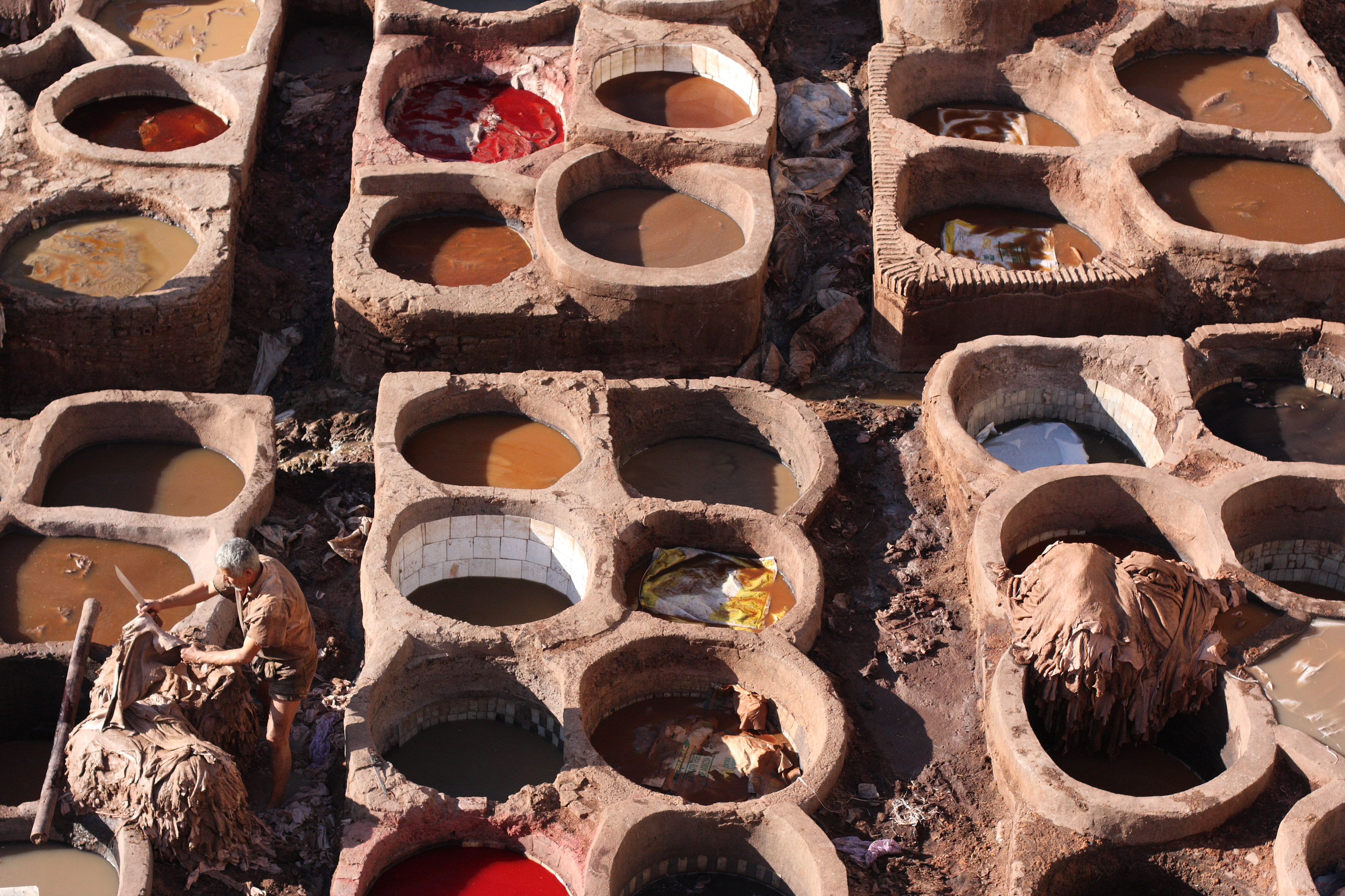 Fez Medina, Morocco